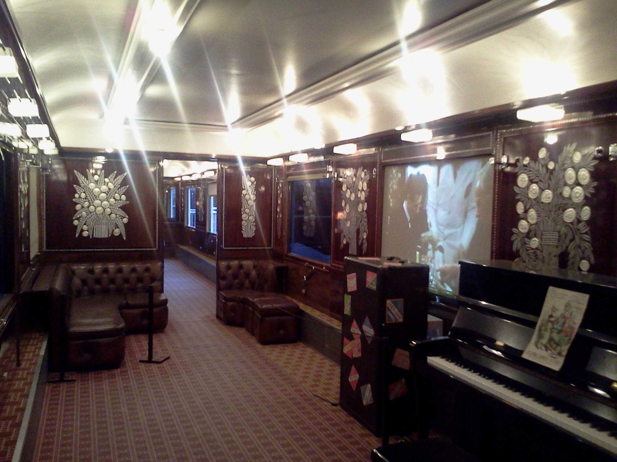 Intérieur d'une voiture-bar de l'Orient-express, exposée à Paris, à l'Institut du monde arabe, en 2014